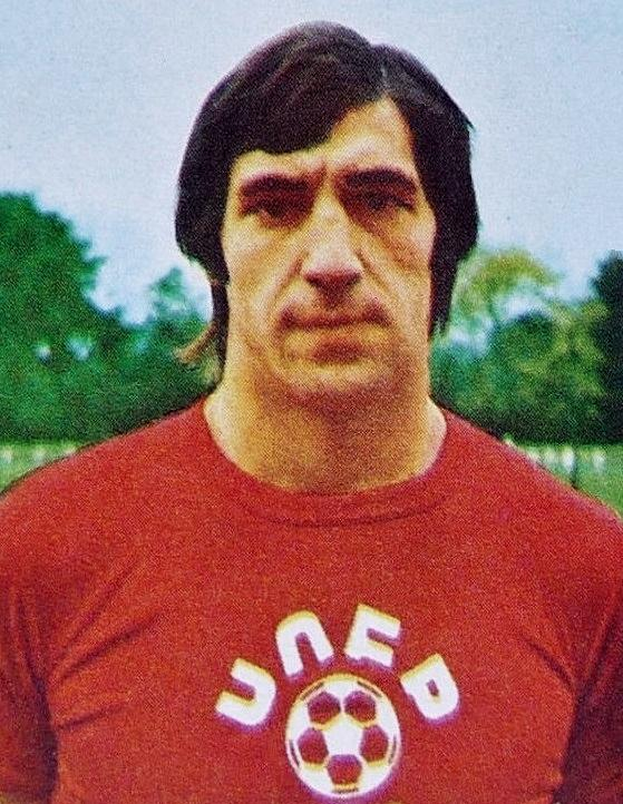 Jean-Paul Bertrand-Demanes en 1974, 'Ageducatifs Football 1974 - 1975', Panini figurina n°1.